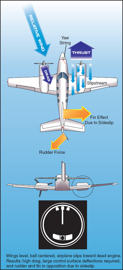 Figure 12-16. Wings level engine-out flight.